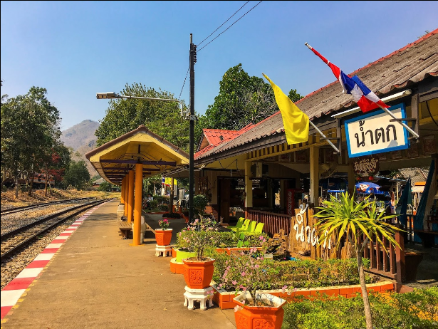 ภาพสถานีรถไฟ จากGoogle